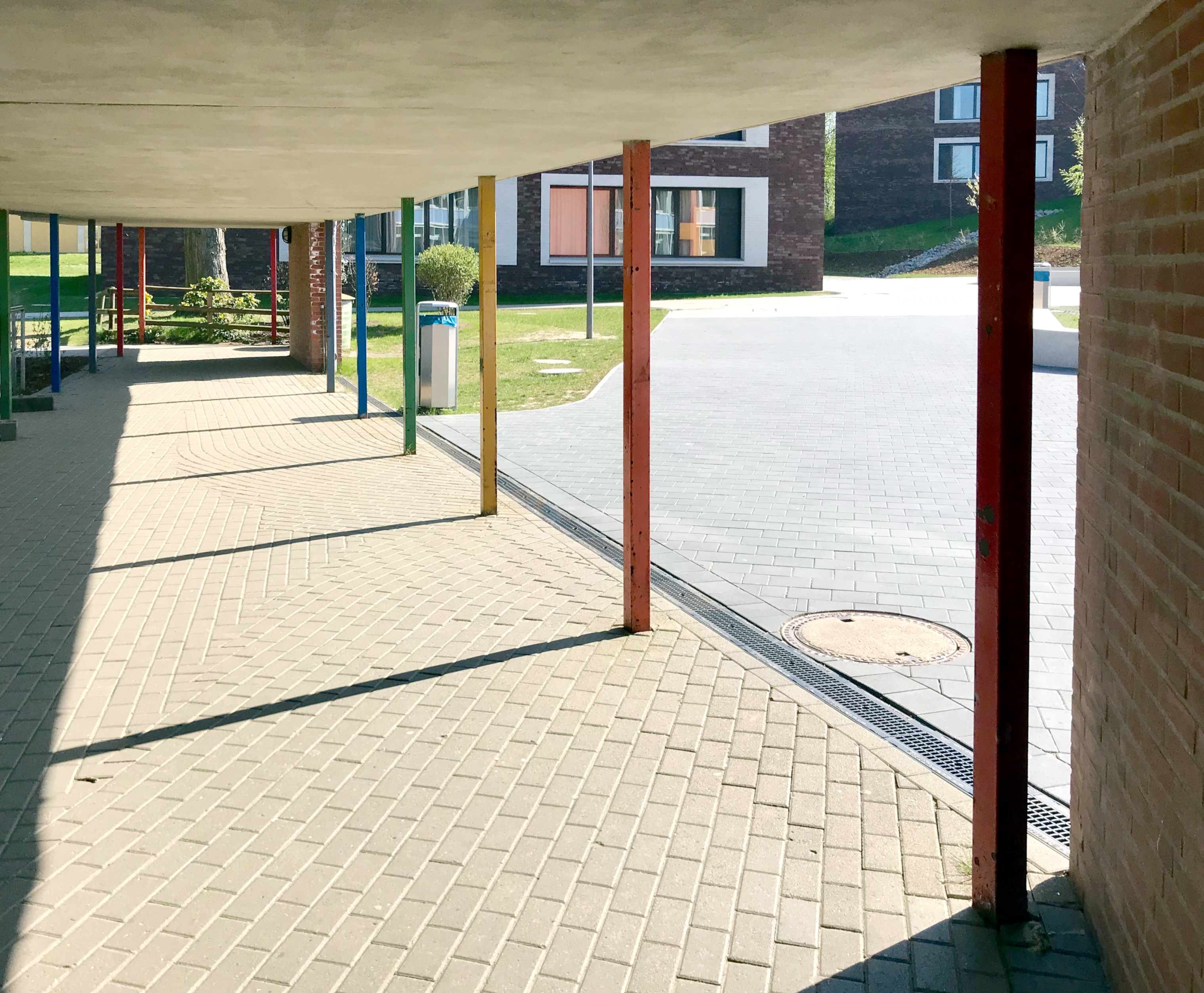 Alexander-von-Humboldt-Gymnasium in Hamburg-Wilstorf. Laubengang, der Küchengebäude mit Unterrichtshaus (Raum 71 und 72) verbindet.